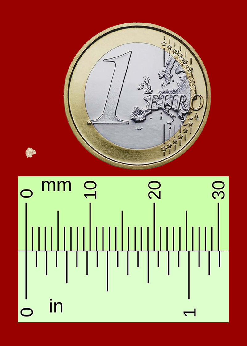 La miga de la imagen contiene cantidad sobrada de gluten para desencadenar reacción en los celíacos y en los sensibles al gluten